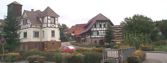 Ohlsbacher Dorfkern. Links das alte Feuerwehrhaus.